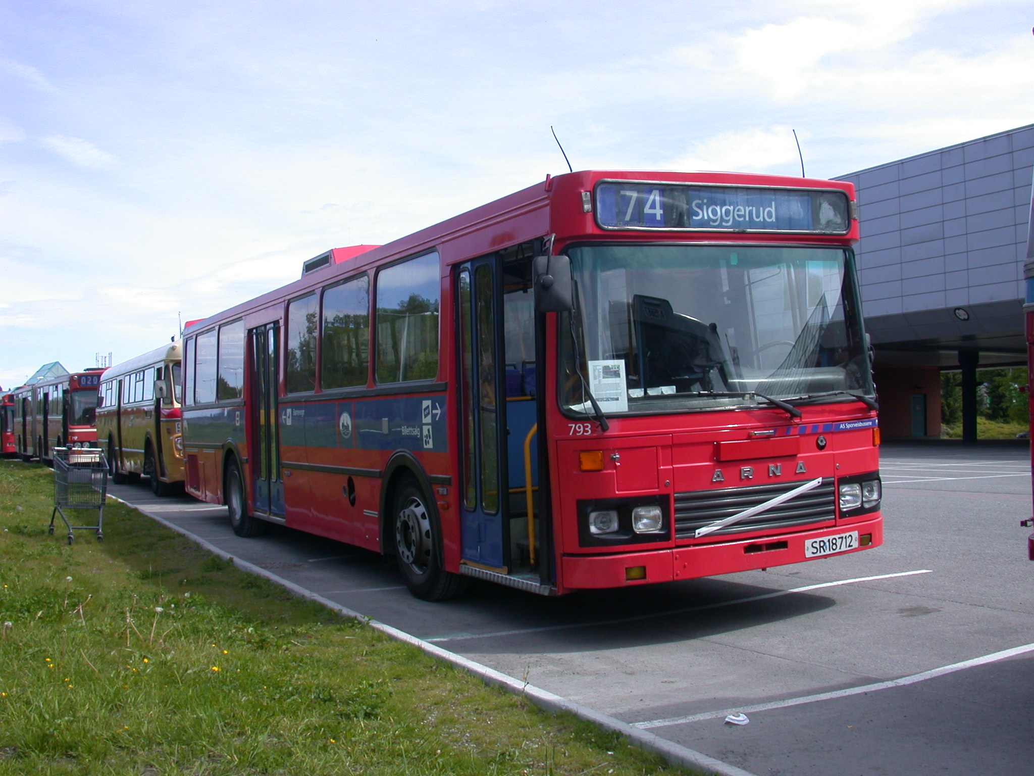 Denne serien busser til Oslo Sporveier var Arnas største enkeltleveranse.